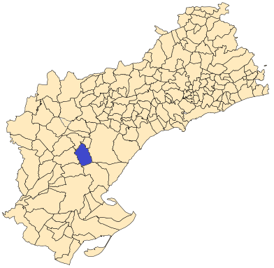 Situación de Rasquera en la provincia de Tarragona.